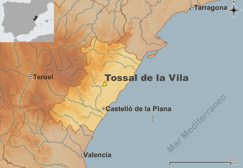 Mapa de situación del Tossal de la Vila